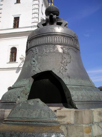 Tsar Bell in Moscow Kremlin